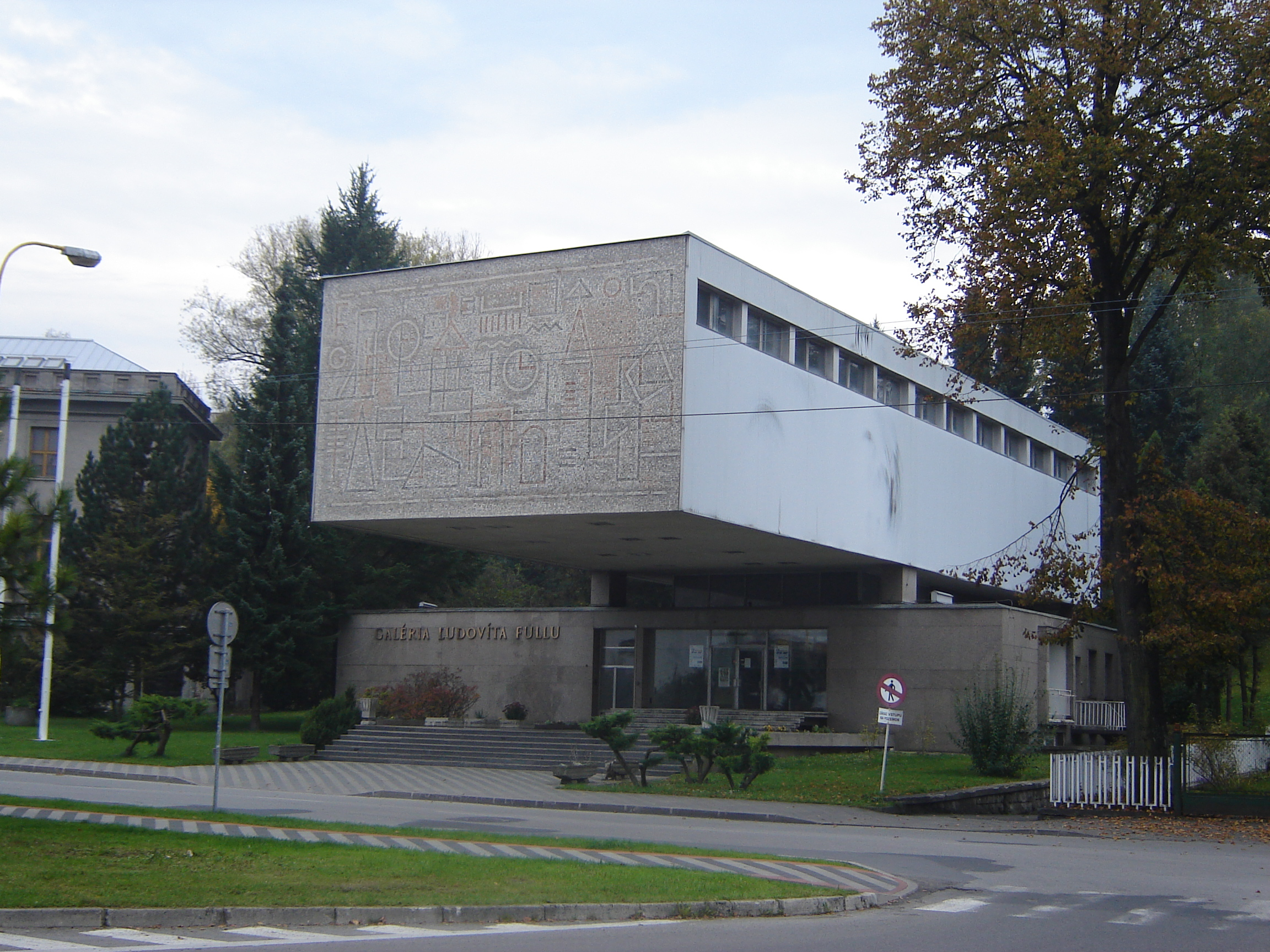 Galéria Ľudovíta Fullu